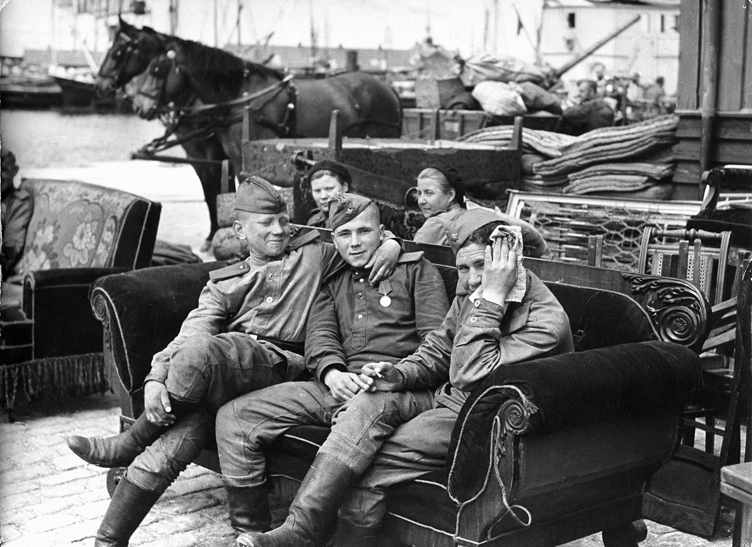 Dato: Mellem 9. Maj 1945 og 5. April 1946 Sted: Bornholm, uden nærmere stedsangivelse Fotograf: V. Hansen, Berlingske Tidende Se flere billeder her: Download and rights: More about The Museum of Danish Resistance (Frihedsmuseet)